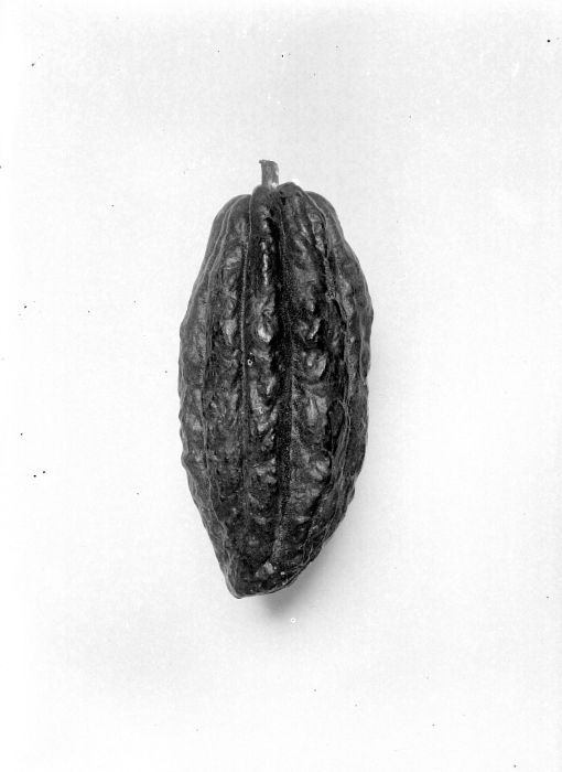 Negatief. Een Criollo cacaokolf